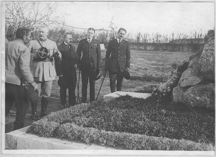 reportage photographique de l'armée française.